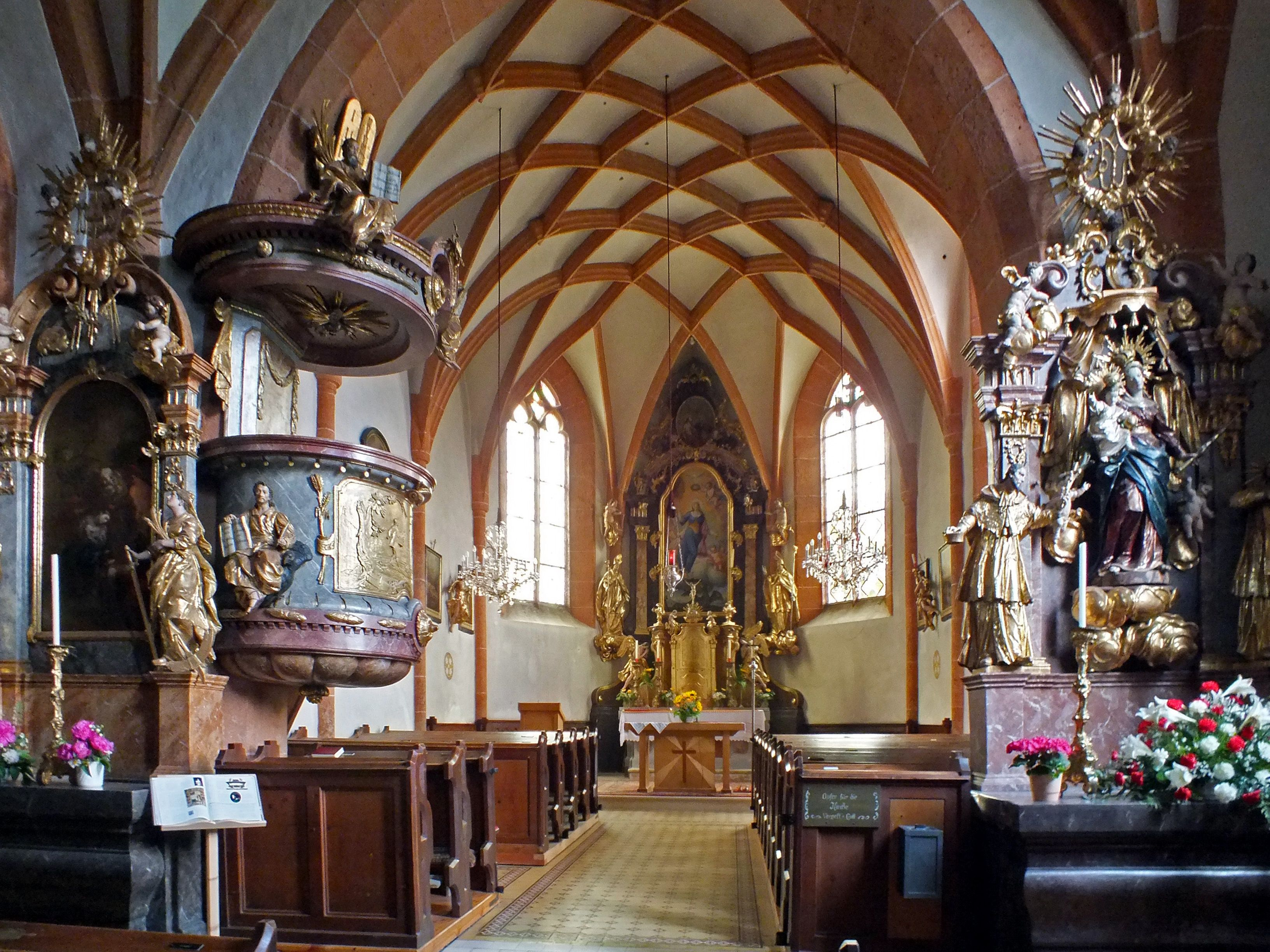 Deitsch: Die Innenausstattung der Pfarrkirche Bad Mitterndorf, gestaltet von Johann Fortschegger